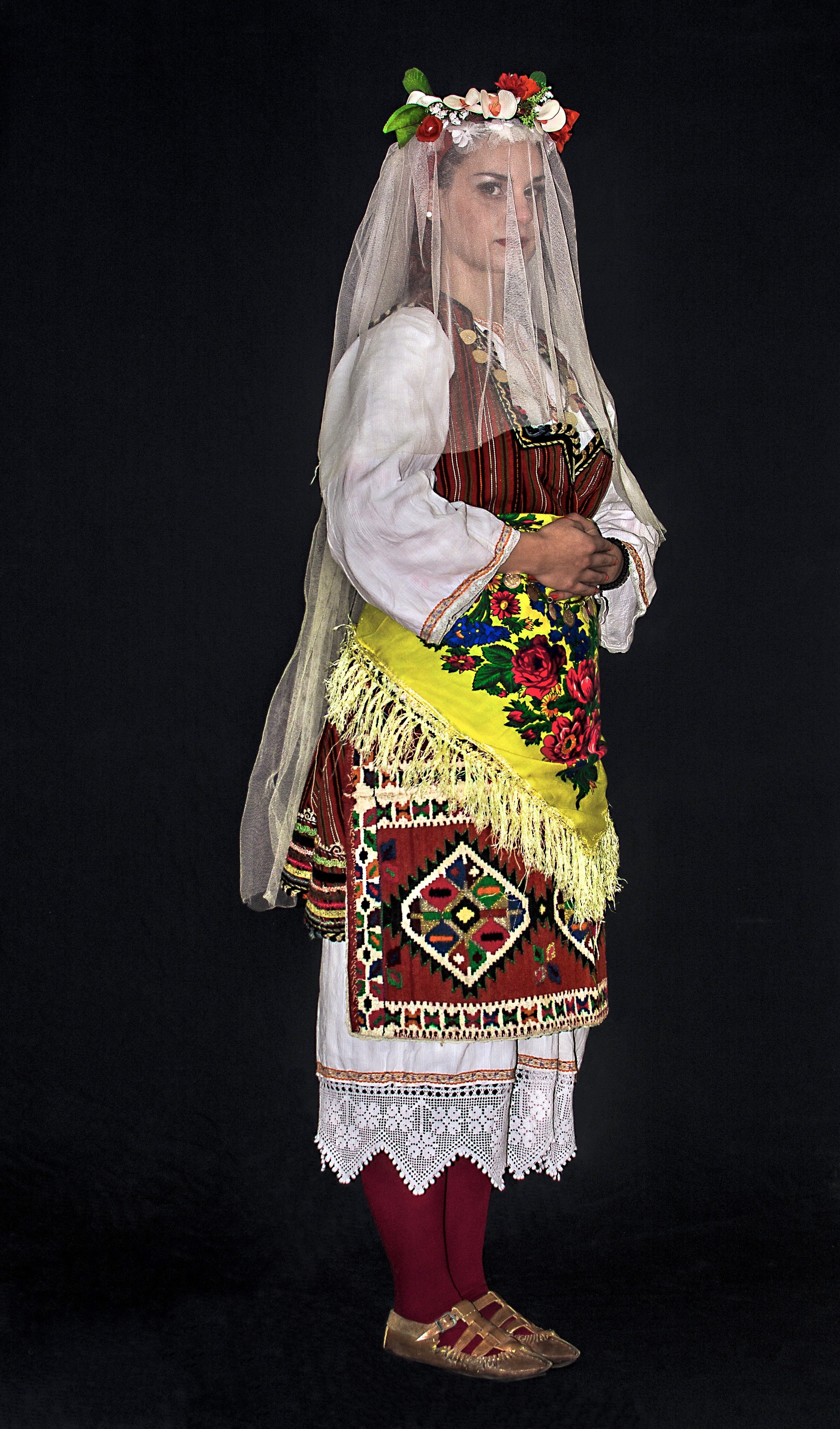 Циклус на народни носии од различни делови на Македонија Невеста (носија) - Раштак Скопска Црна Гора